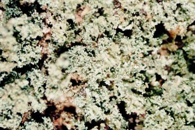 Cladonia parasitica